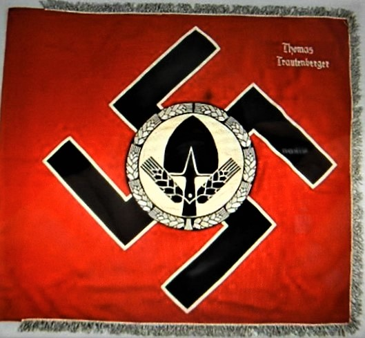 RAD-Fahne der Abteilung in Sprottischwaldau ; Nachlass des RAD vor 1945